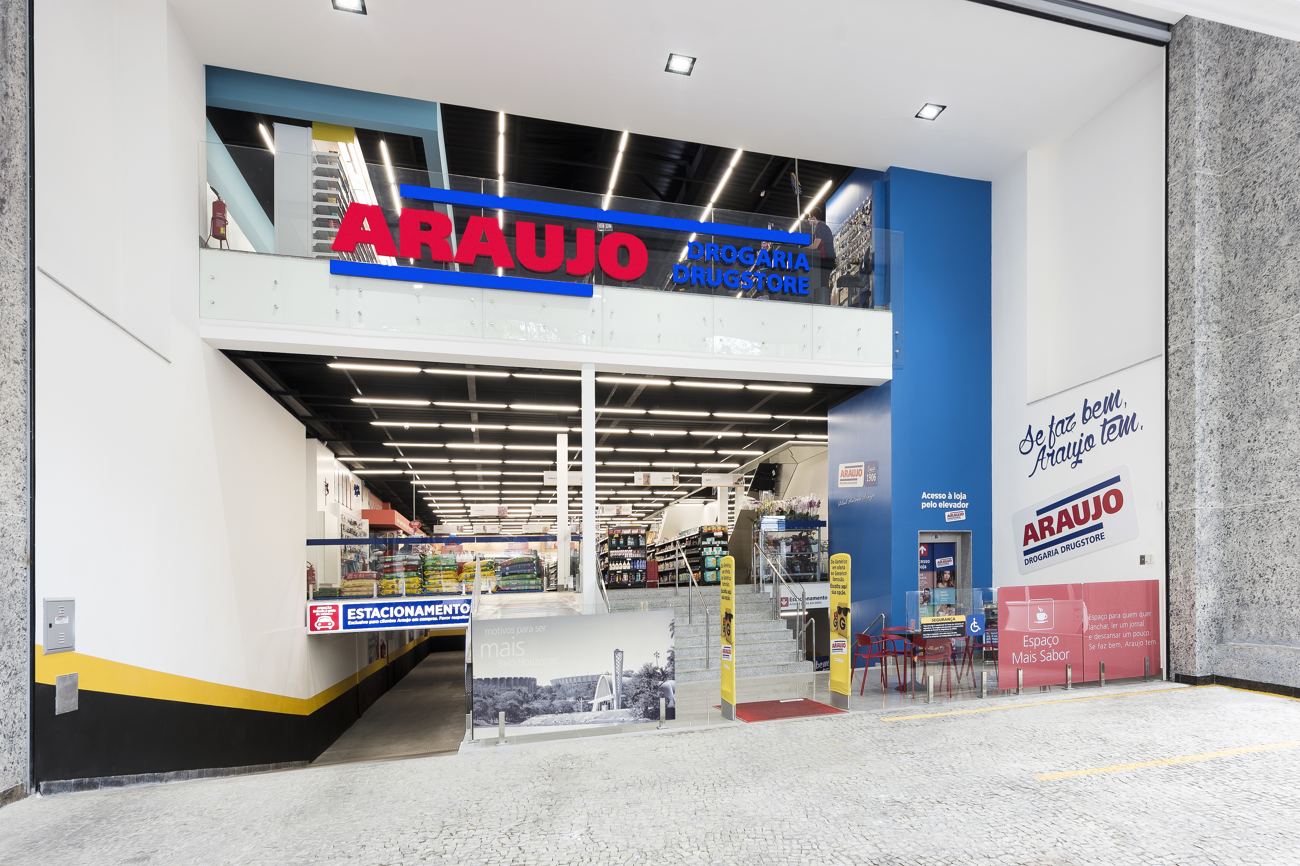 frente de loja